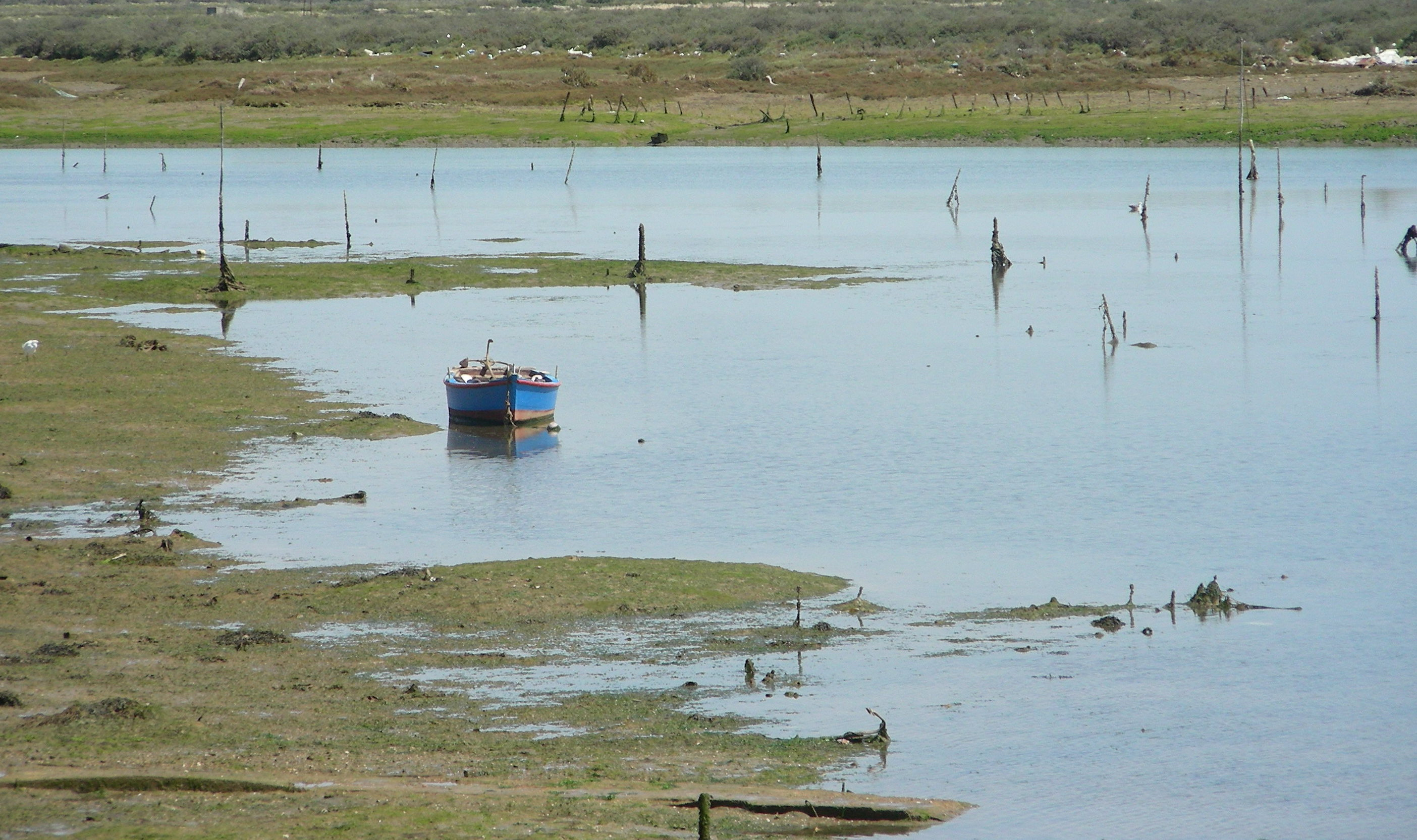 Marismas de Isla Cristina, en la provincia de Huelva (España) - Caño del Puntal